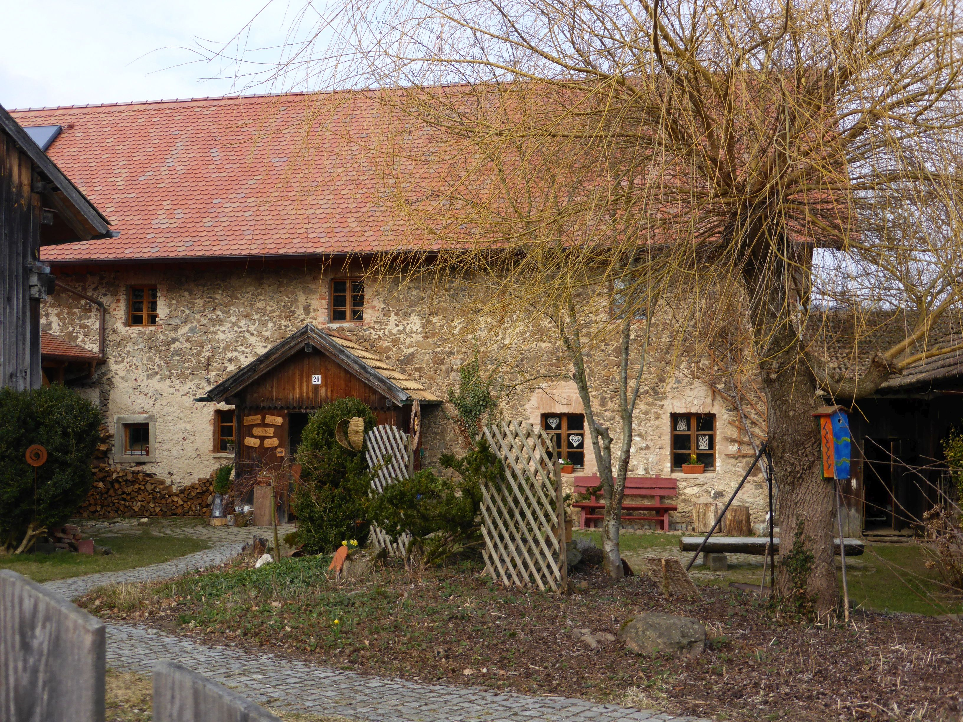 Kager (Haus Nr. 20)